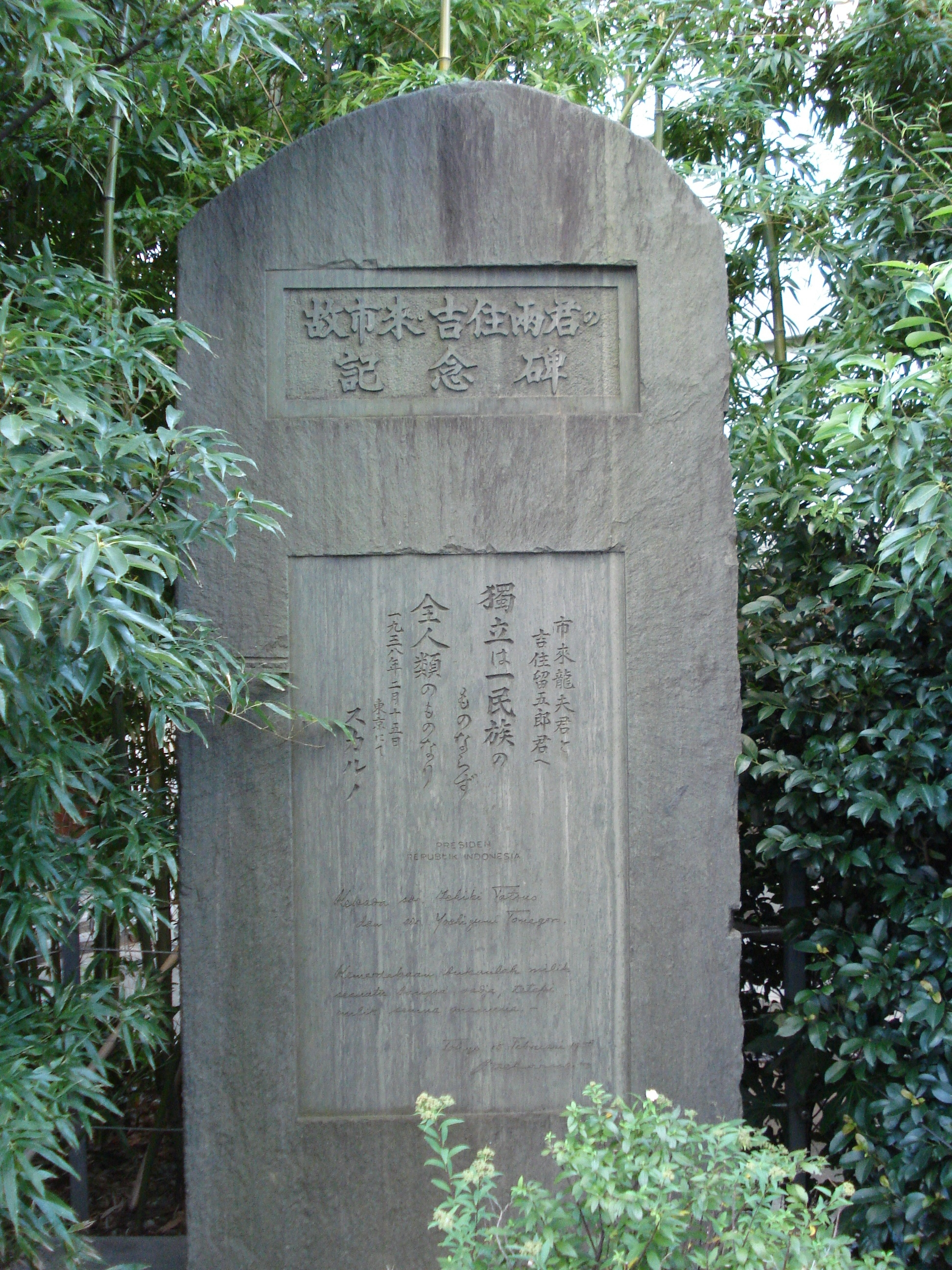 seishoji